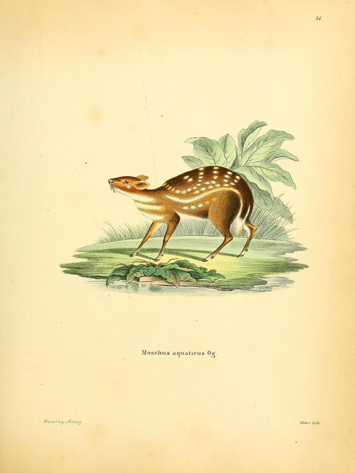 )#\ fe ; I V Moschus aquaticus 0?. Jmorßs'Uzf cMenaa.